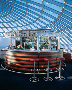 Perlan Bar, Iceland